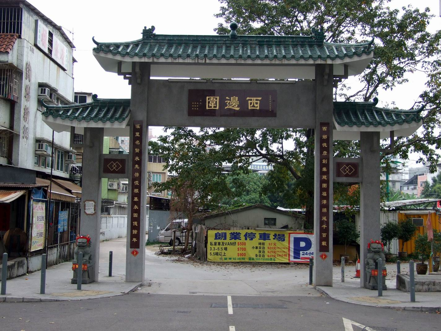 西邊圍牌坊